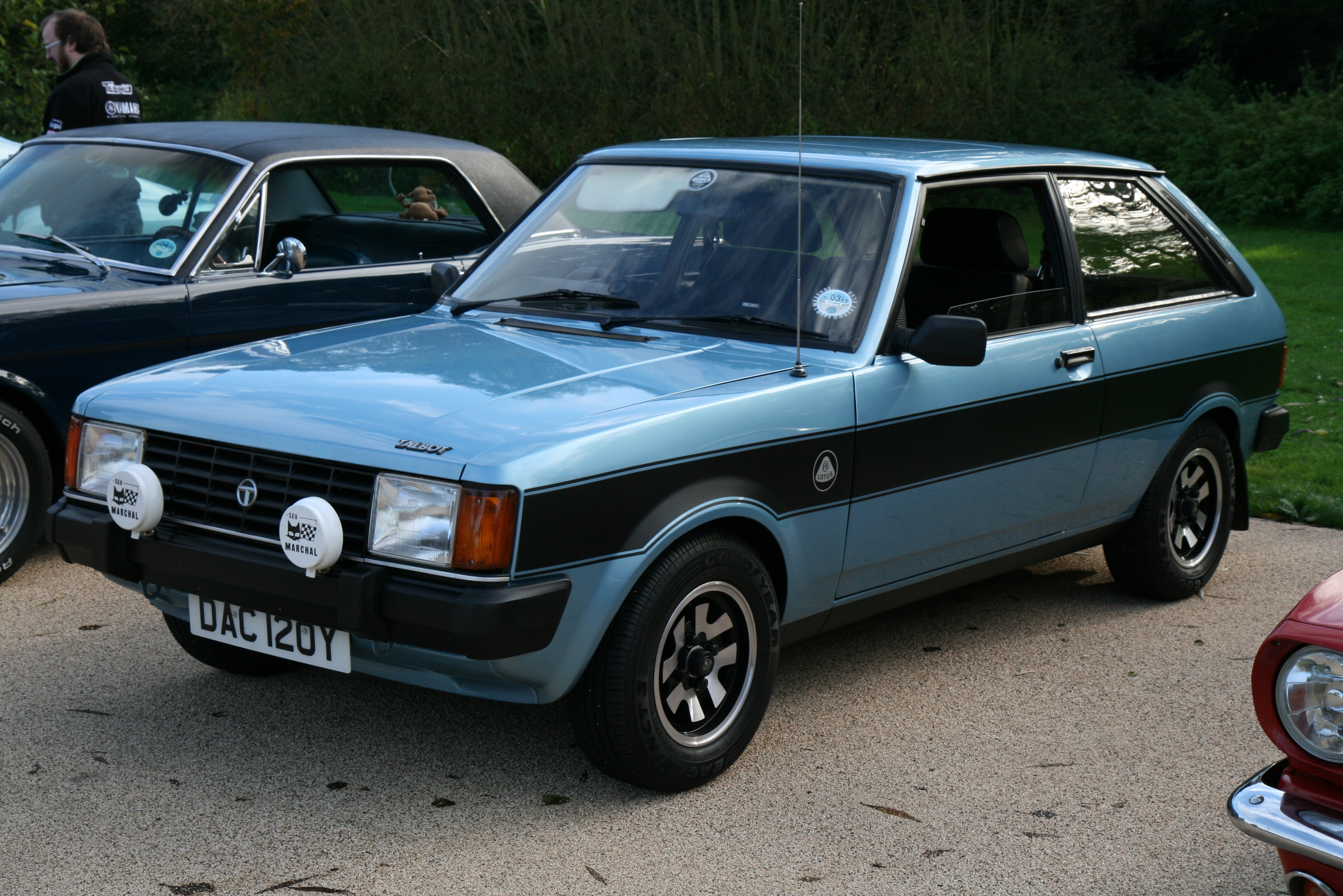 1983 Talbot Sunbeam Lotus